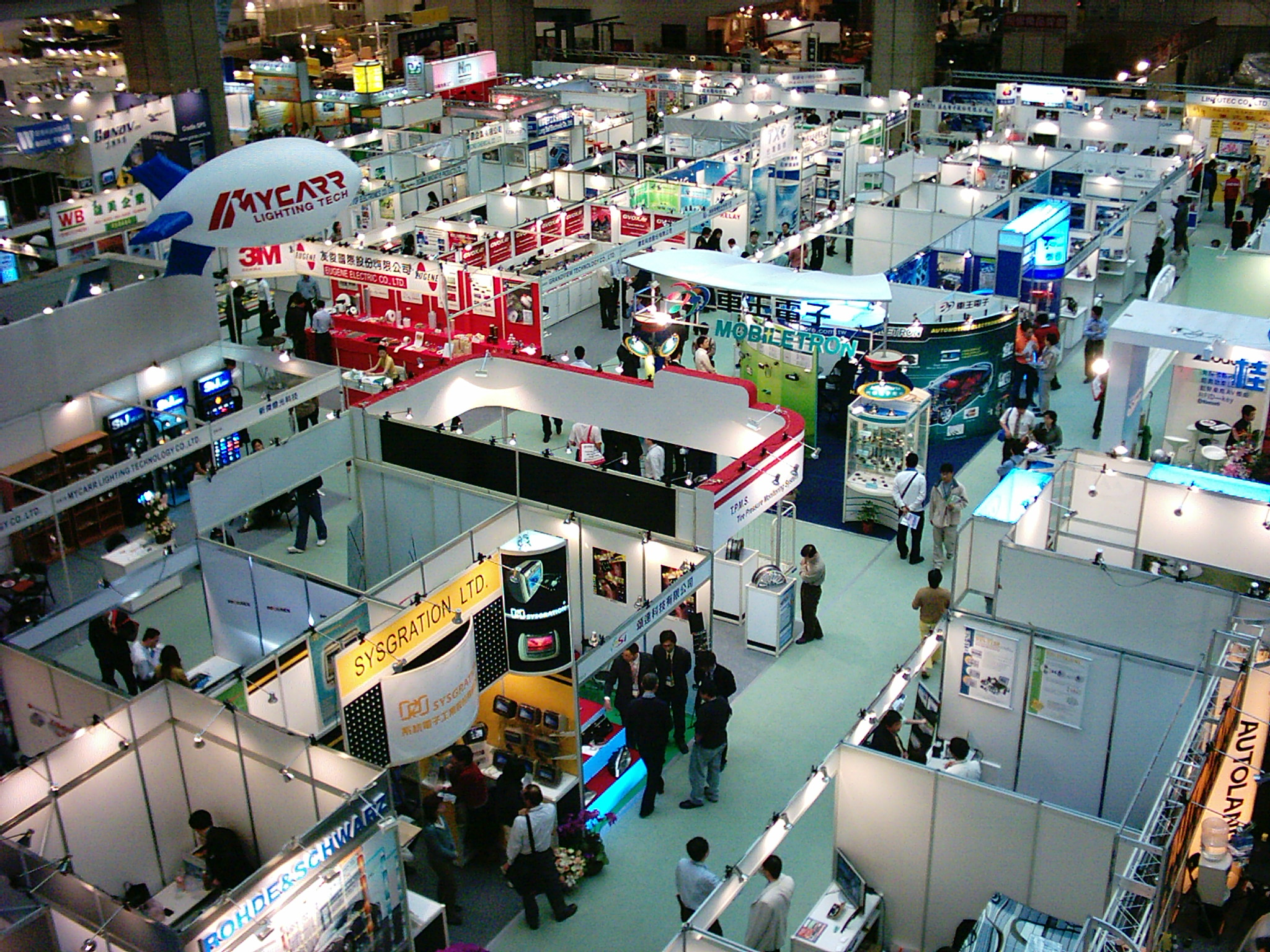 AutoTronics Taipei 2006